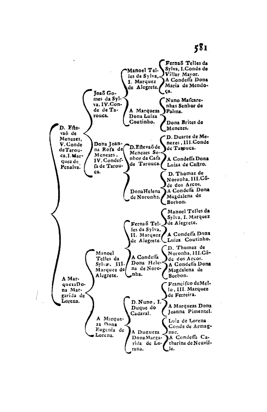 Página 581 das "Memorias Historicas e Genealogicas dos Grandes de Portugal" ― Costados dos Marqueses de Penalva.